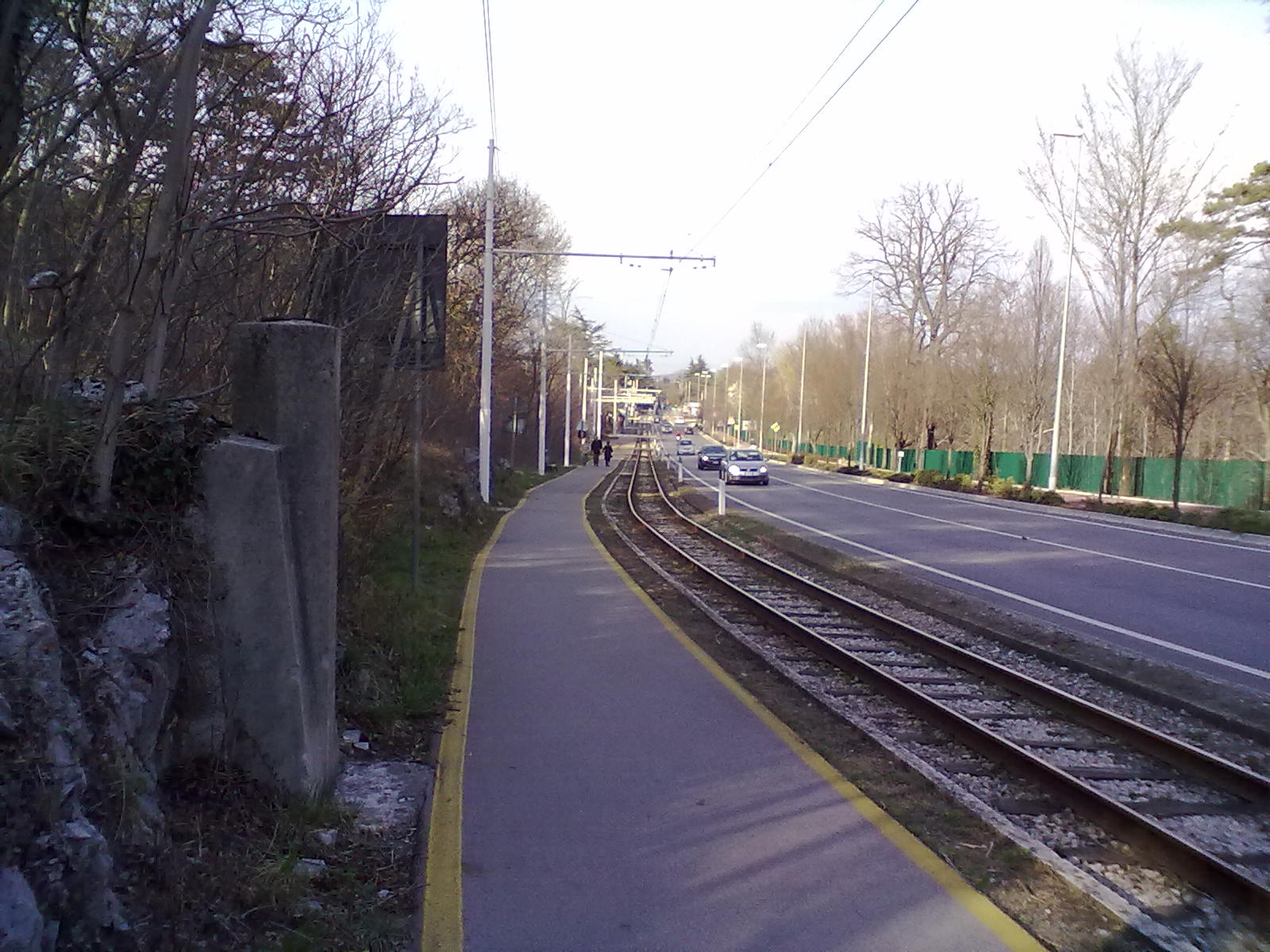 La SR 58 nei pressi del quadrivio di Opicina (TS)